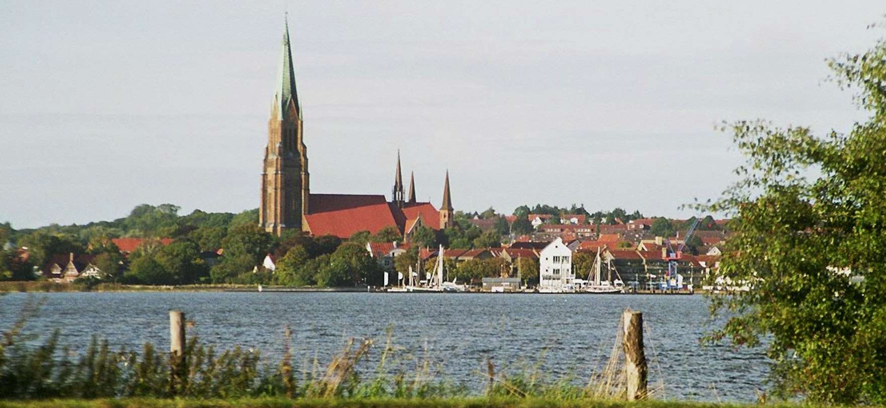 Source: made by WikiTour 2005 Description: (de:) Blick über die Schlei auf die Stadt Schleswig mit dem Schleswiger Dom